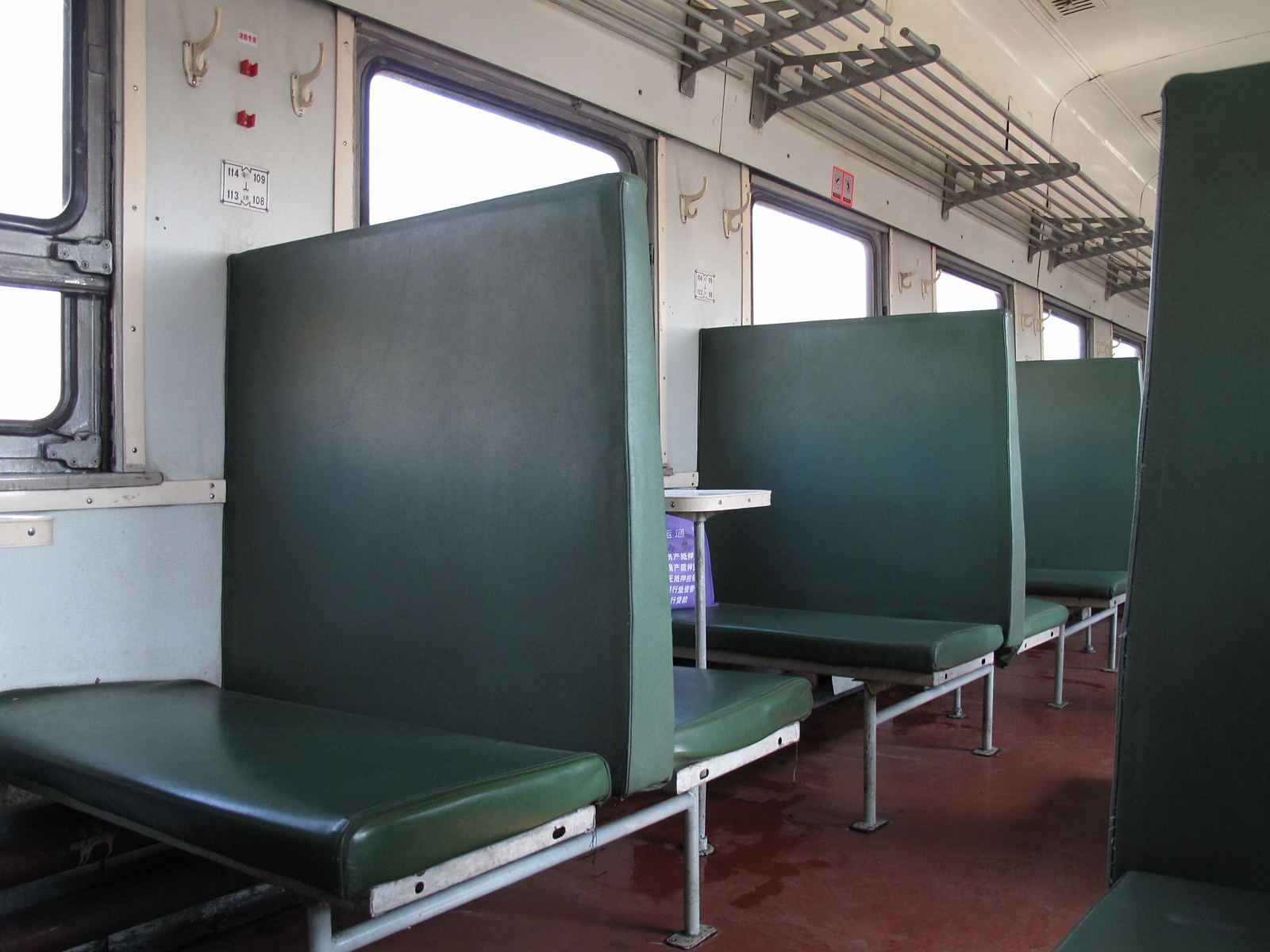 YZ22硬座车内部座椅